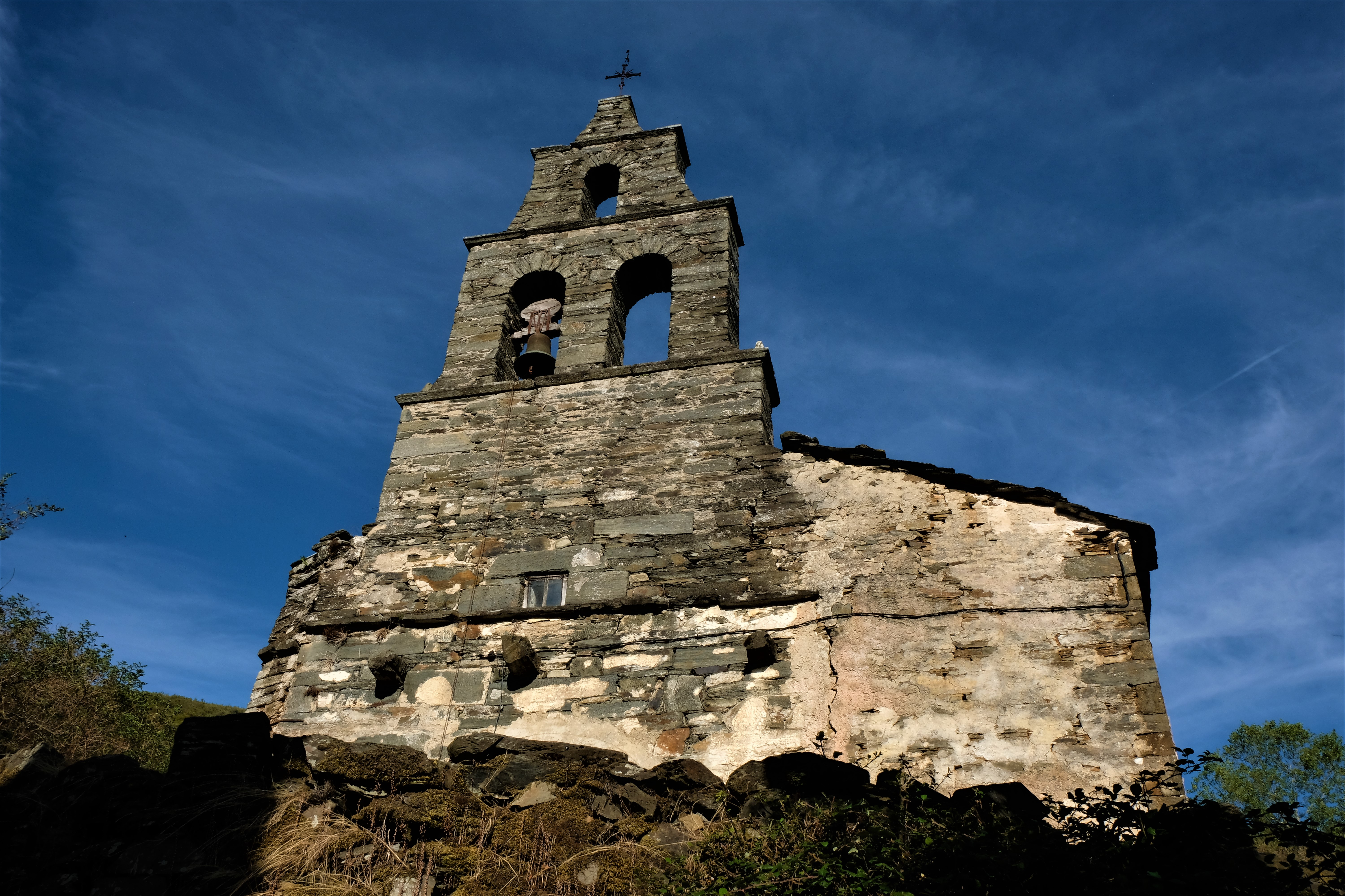 Esta é a Igrexa de Santoalla do Monte, Petín.